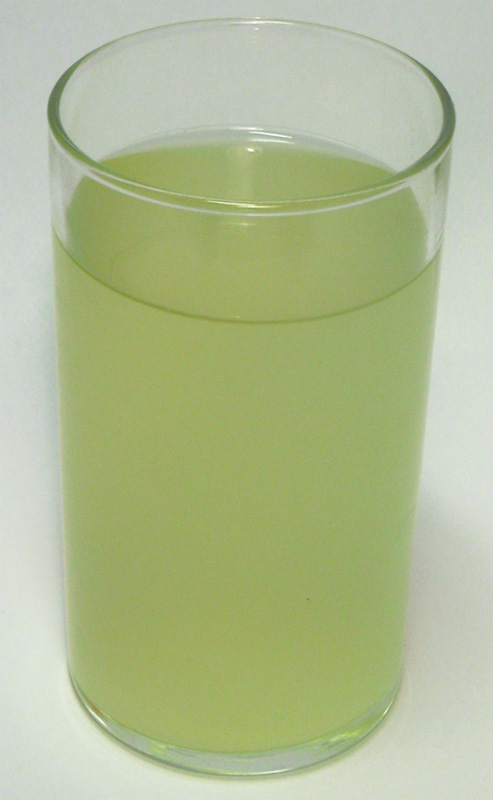 Badischer Federweisser im Glas, 2007 New white wine - "Federweißer" (Baden/Germany, 2007).